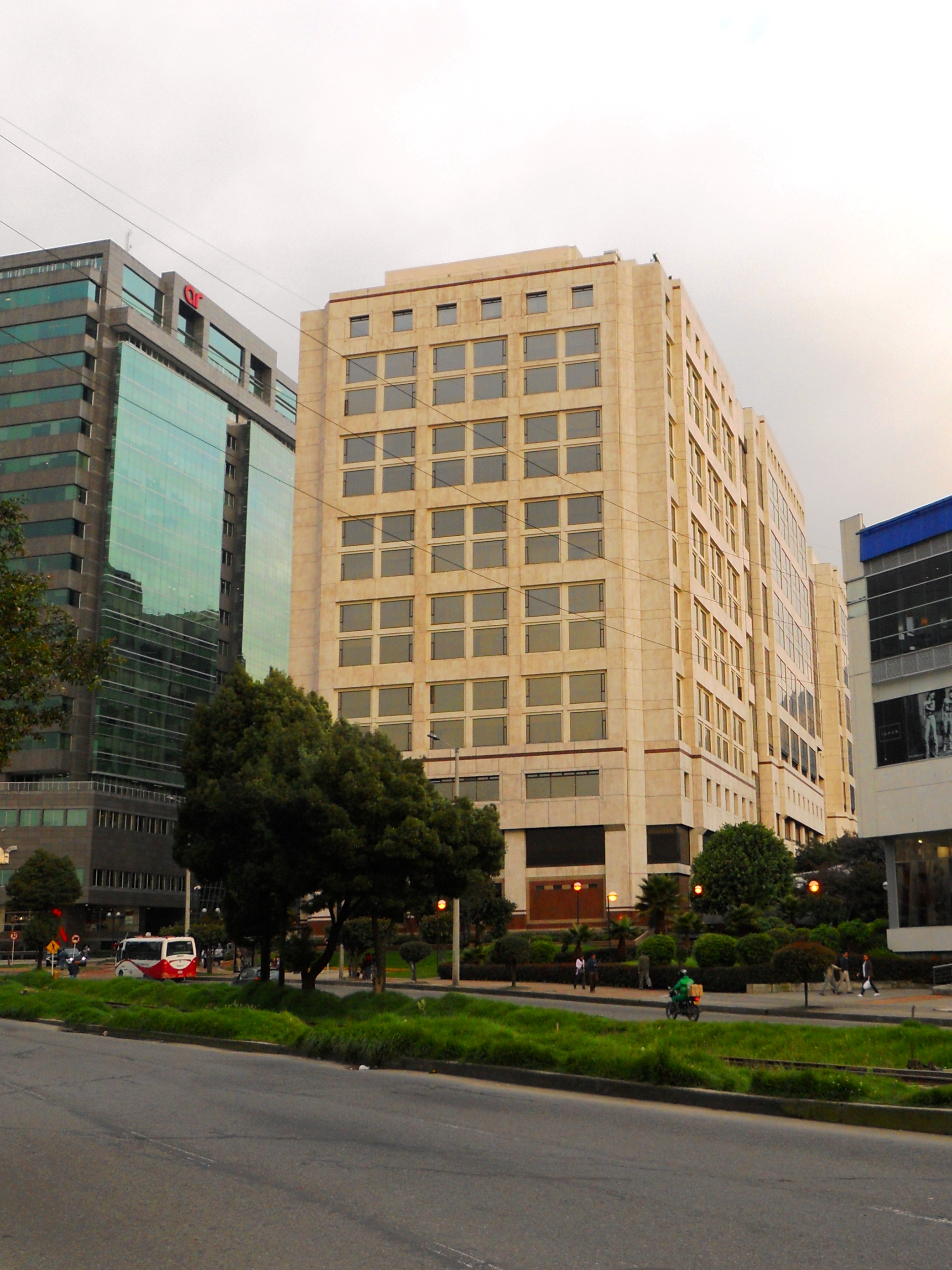 Extremo sur del Centro Empresarial Santa Bárbara.